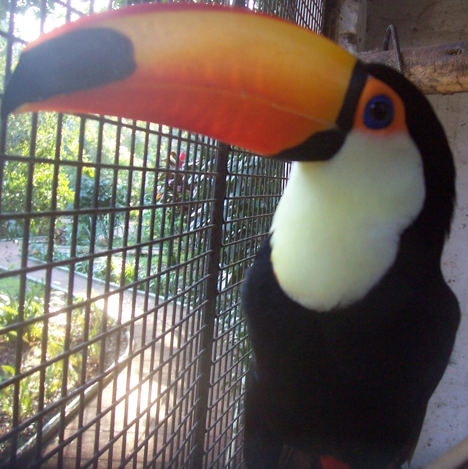 Tucanos en el Jardín de los Pájaros, ubicado en la ciudad de Oberá, Argentina.